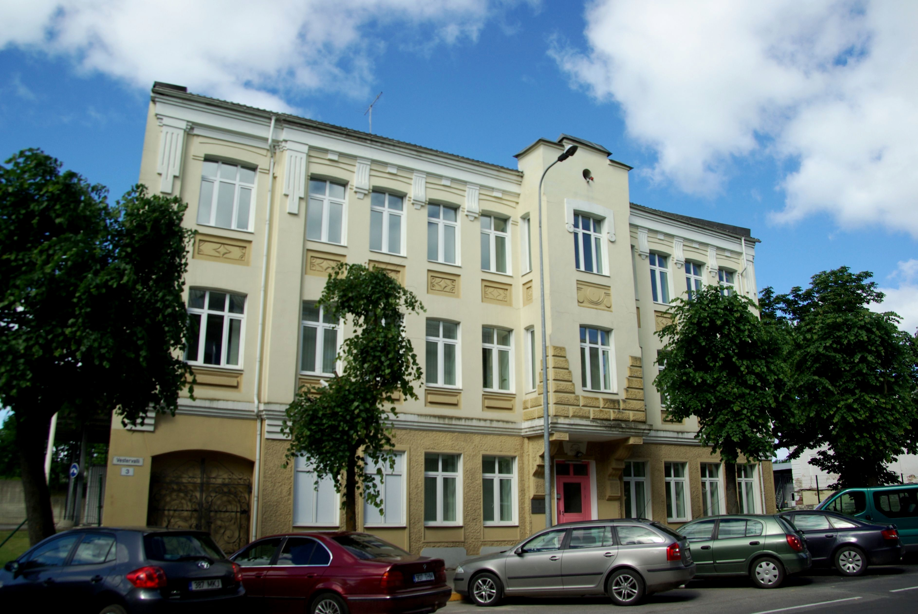 Narva pangahoone, 19.saj.